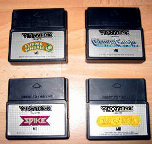 Mudule für das Vectrex Videospiel